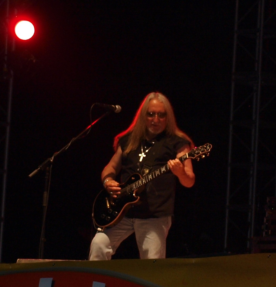 Uriah Heep na Mega Bikers susretima u Slavonskom Brodu, 9. svibnja 2009. godine.